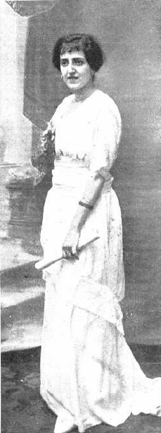 Fotografía de la pianista española Emiliana de Zubeldía publicada en 1914 con motivo de haber ofrecido un recital en el Gran Casino de San Sebastián